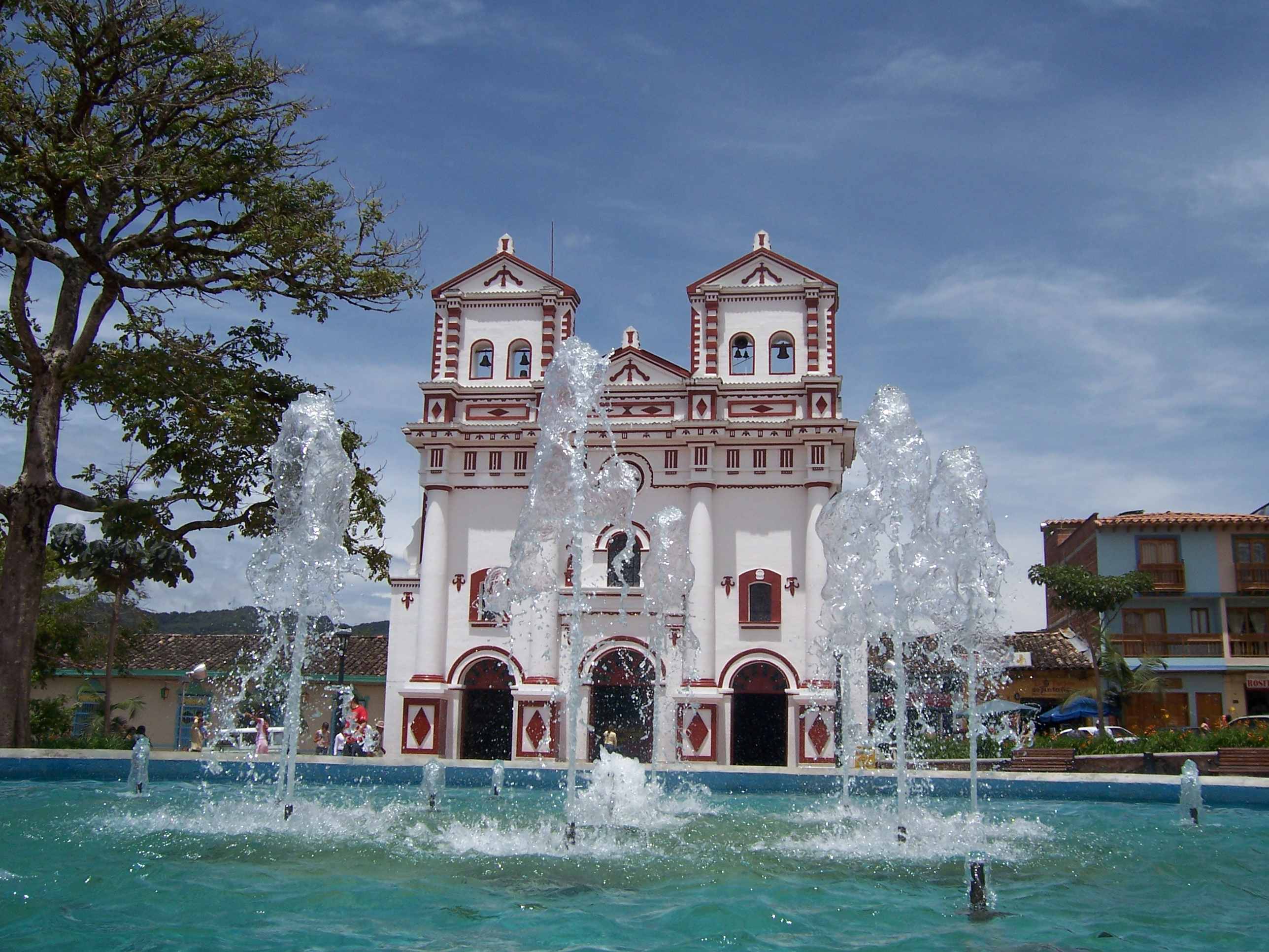 Iglesia de Guatapé, Colombia.